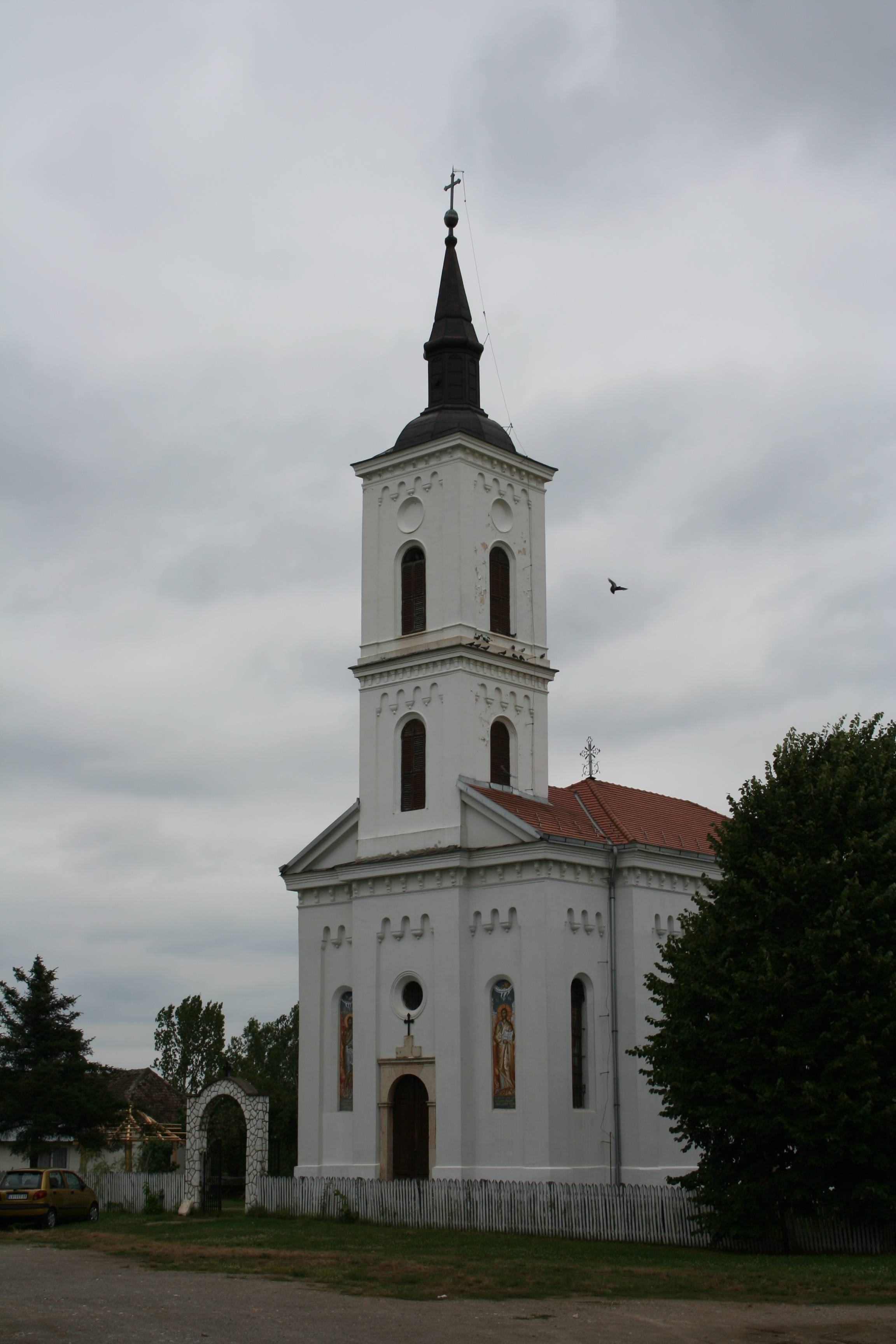 Crva rođenja Svetog Jovana Krstitelja, Nakučani